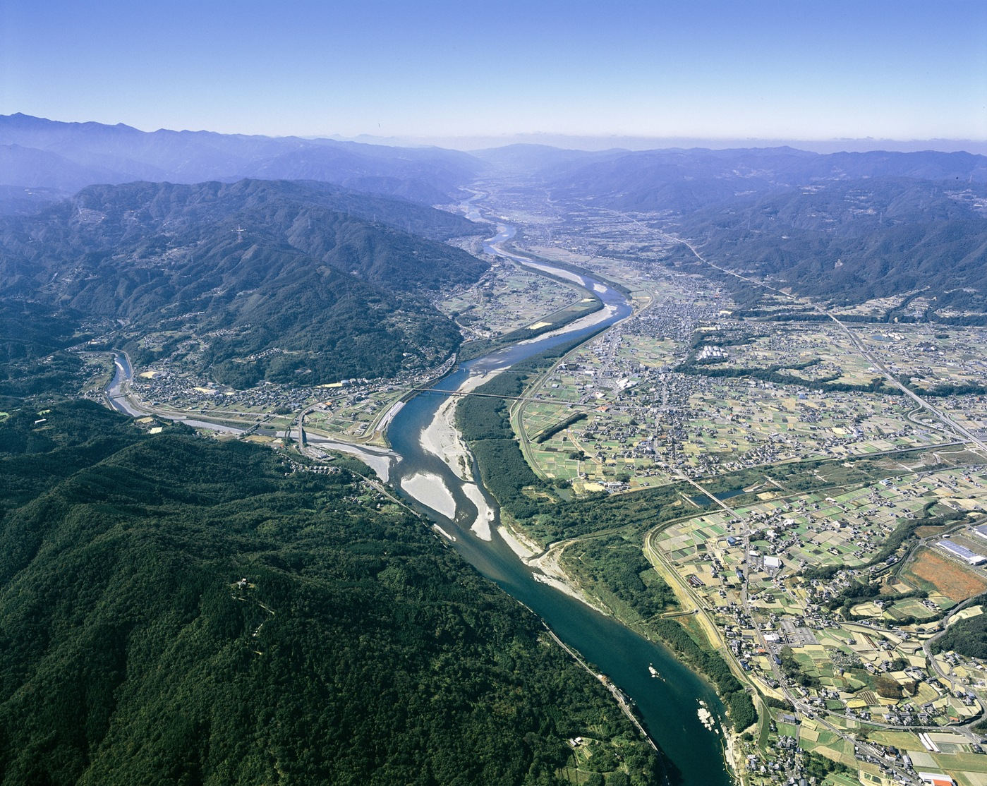 The Yoshino River and Anabuki (left) in Mima, Tokushima, Japan